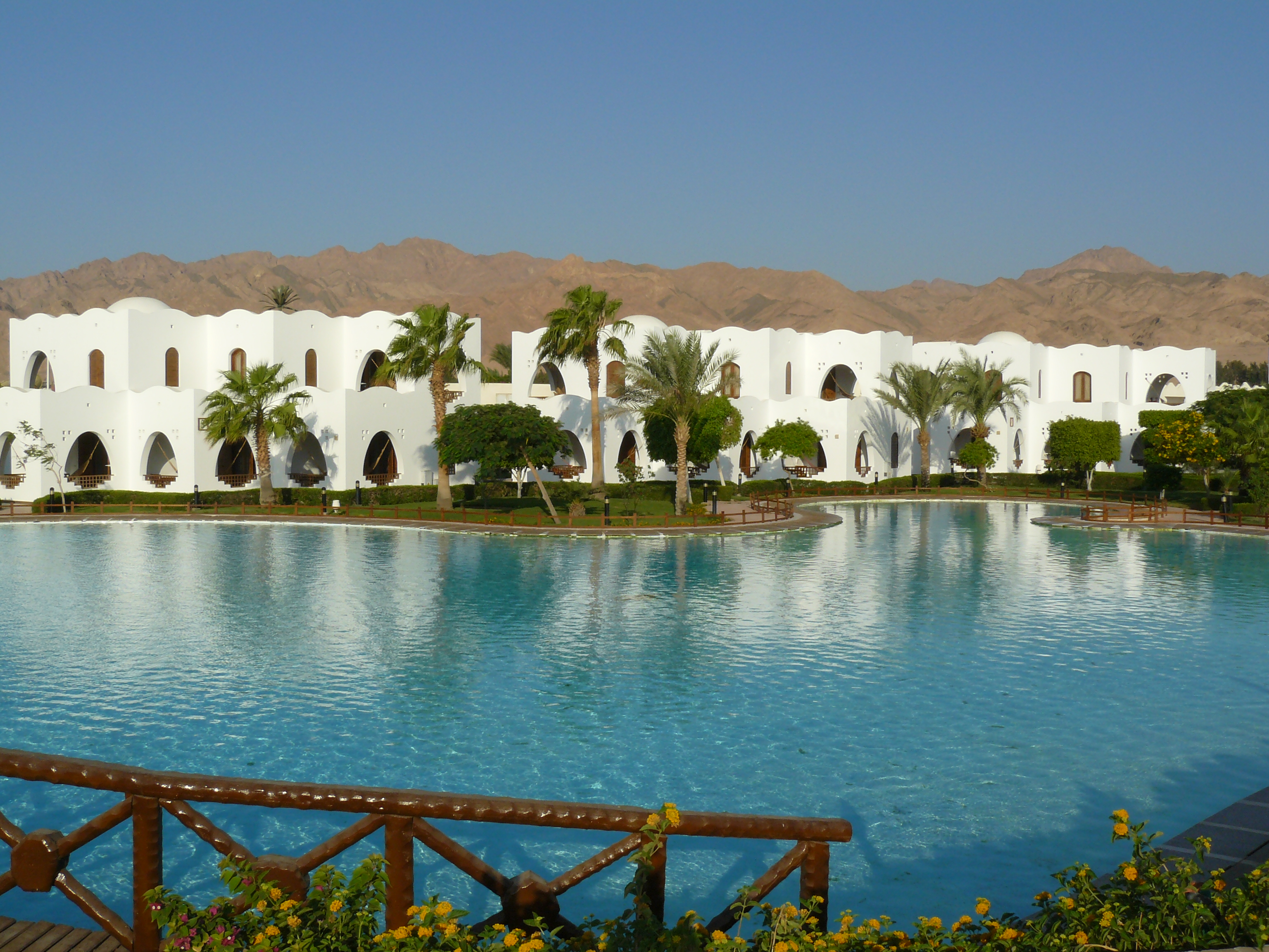 Hilton Hotel, Dahab